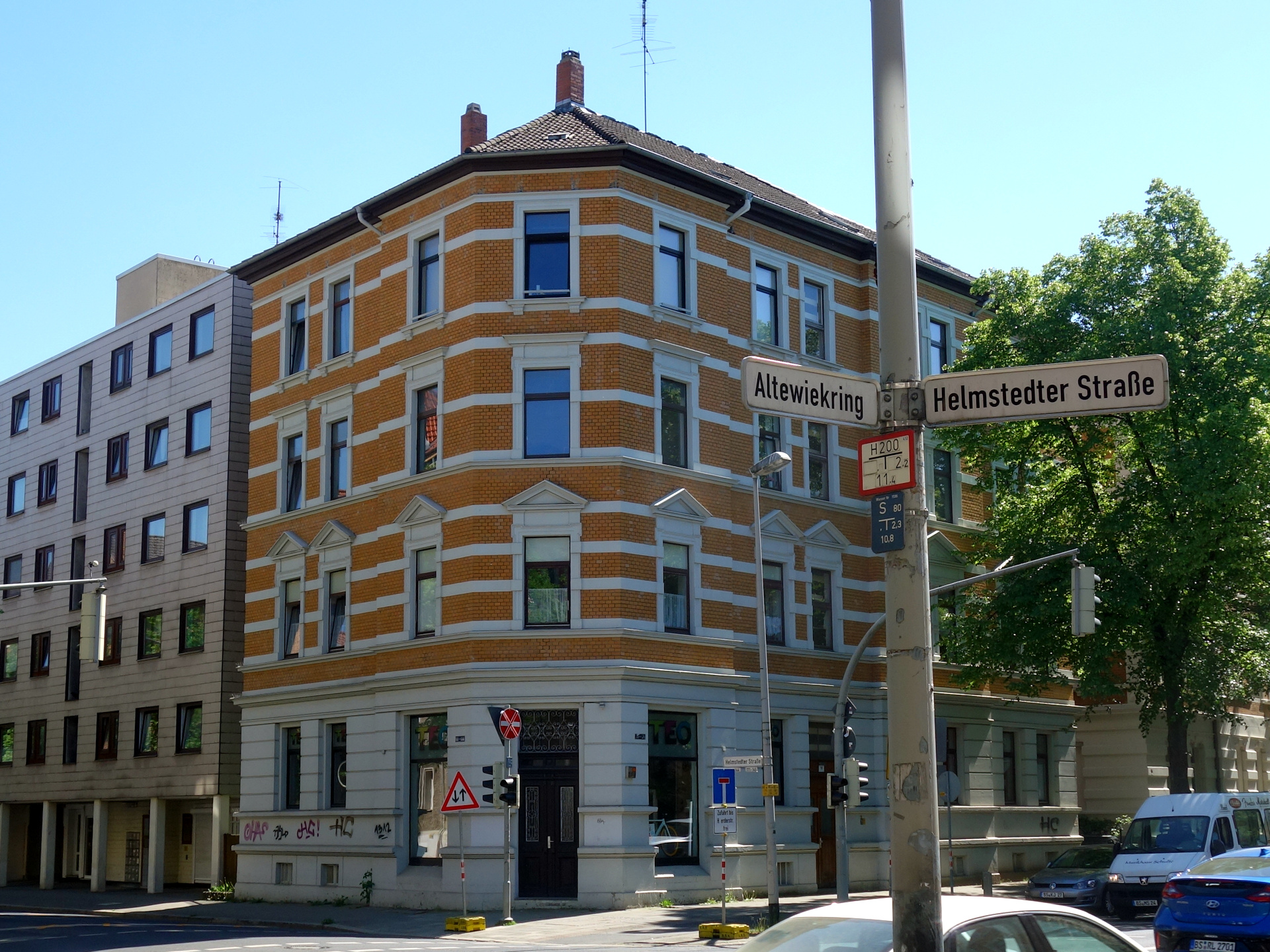 Altewiekring 70 im Mai 2018 Eckansicht von Norden.